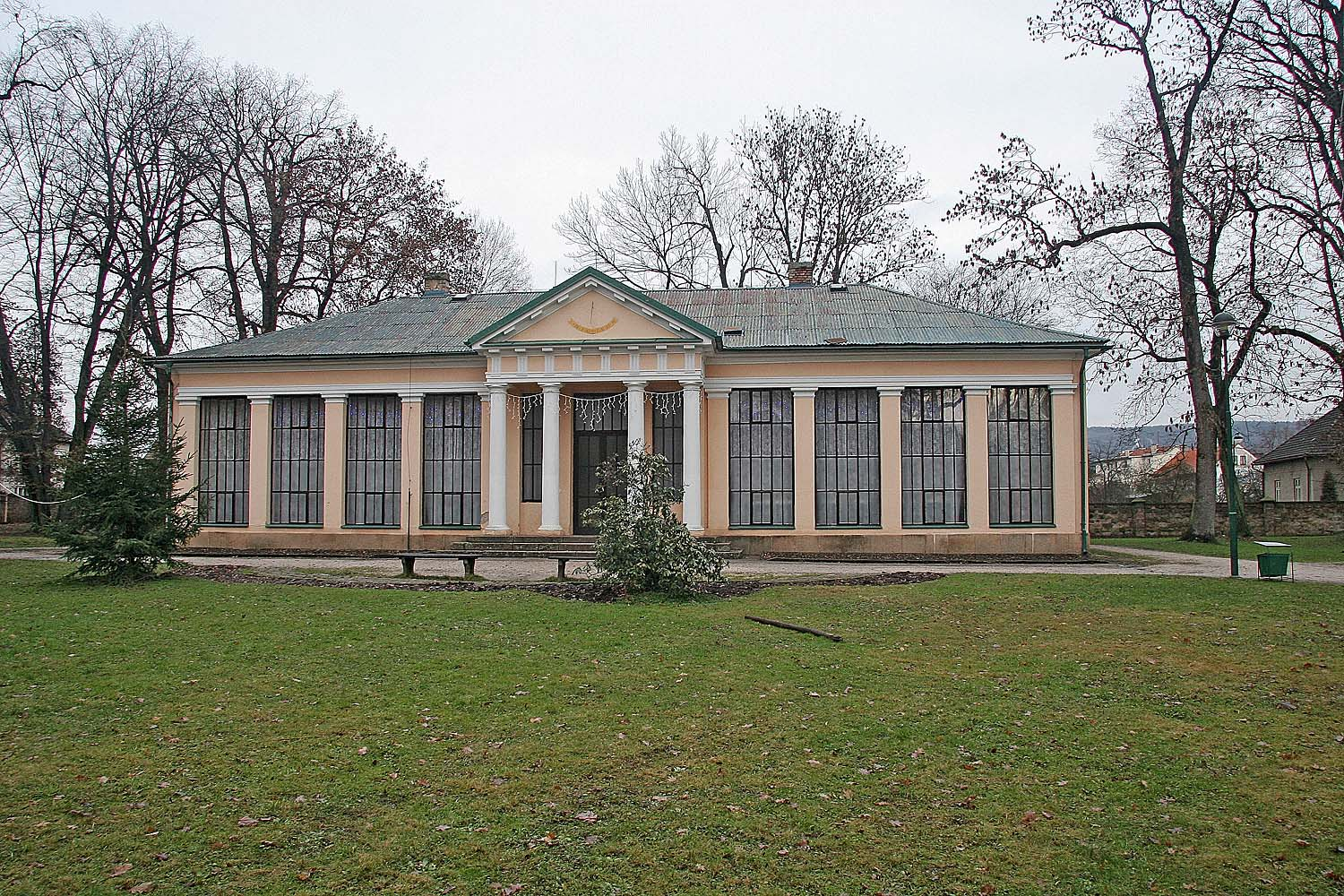 Lázně Bělohrad, okres Jičín. Památník K. V. Raise u zámku